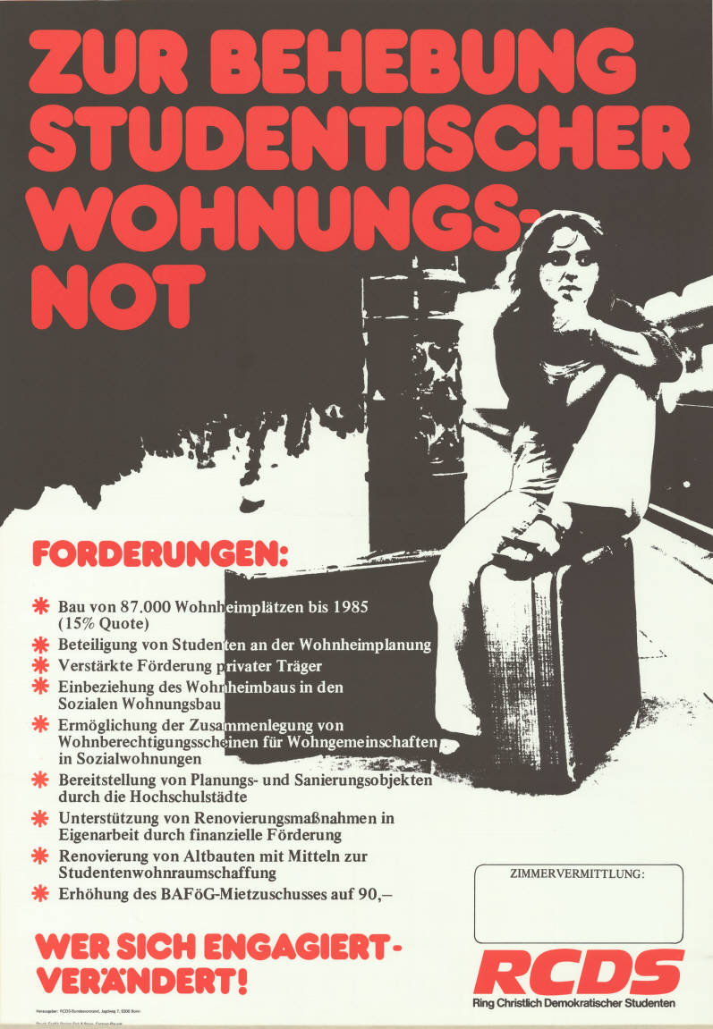 Zur Behebung studentischer Wohnungsnot Forderungen: ... Wer sich engagiert - verändert! RCDS Abbildung: Verzweifelte Studentin sitzt auf einem Koffer (Grafik) Kommentar: Thematisiert werden u.a. verschiedene Bau-, Finanzierungs- und Renovierungsmaßnahmen, Erhöhung des BAFöG-Mitzuschusses Plakatart: Motiv-/Textplakat Auftraggeber: RCDS-Bundesvorstand, Bonn Drucker_Druckart_Druckort: Druck Grafik-Design Enk & Posse, Castrop-Rauxel Objekt-Signatur: 10-029 : 3 Bestand: Plakate von Hochschulgruppen (10-029) GliederungBestand10-18: Plakate von Hochschulgruppen (10-029) » RCDS Lizenz: KAS/ACDP 10-029 : 3 CC-BY-SA 3.0 DE